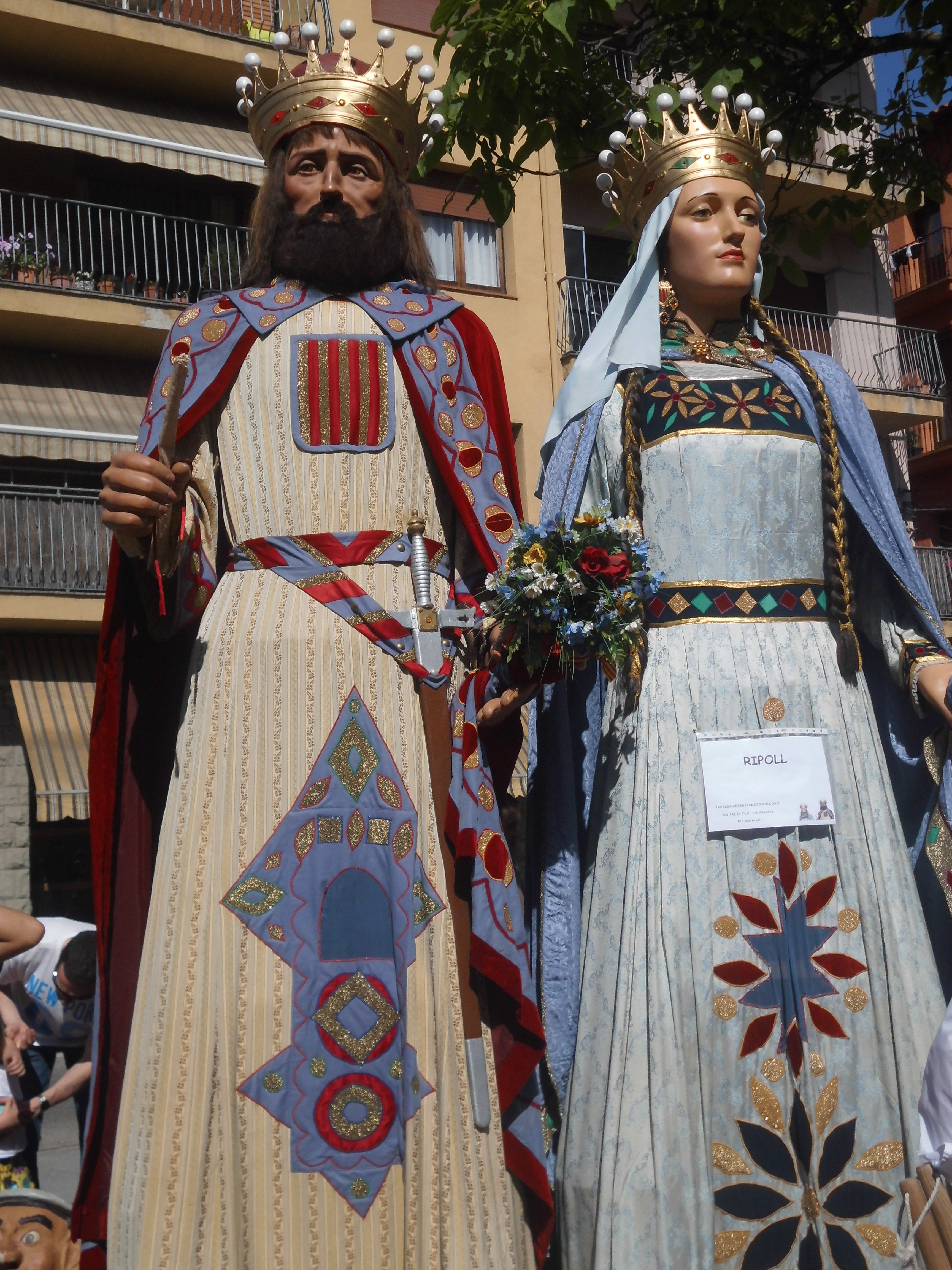 Trobada Gegantera de 2015